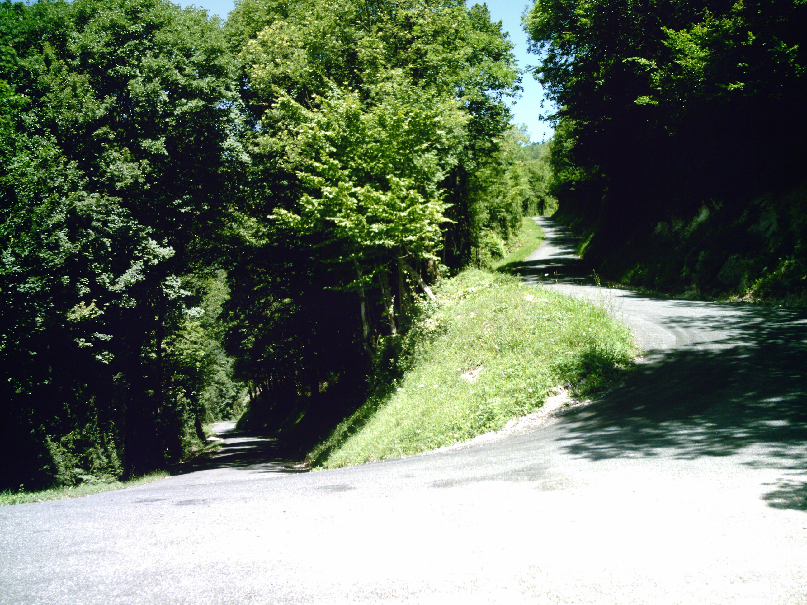 La route de la Serra menant de Bolozon à Napt.